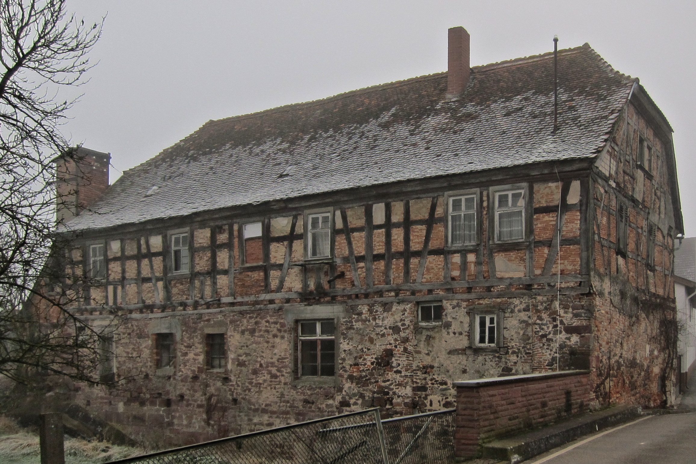 ehemalige Mühle (Sensfelder Hof)